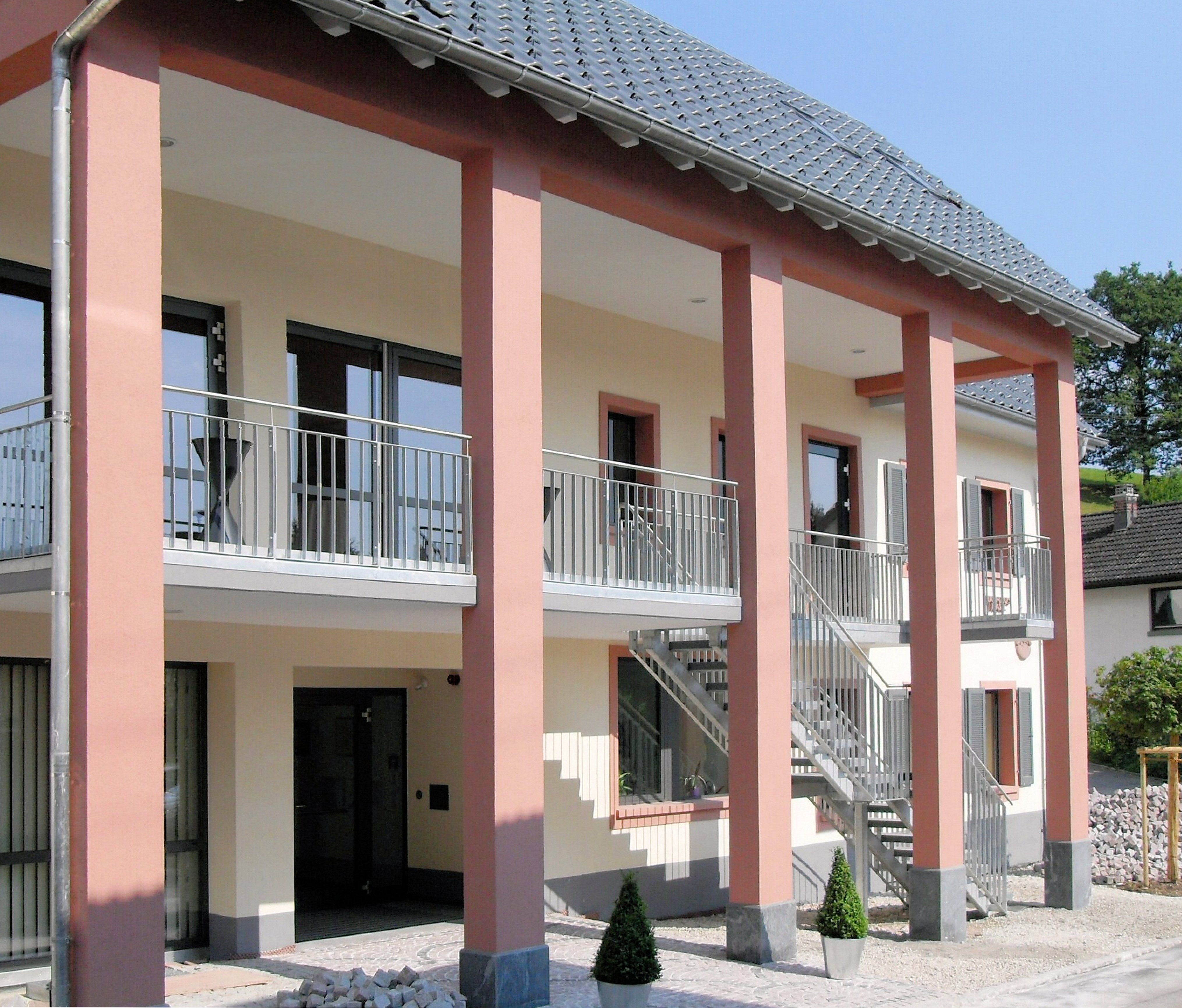 Rathaus in Hasel, Schwarzwald, Deutschland